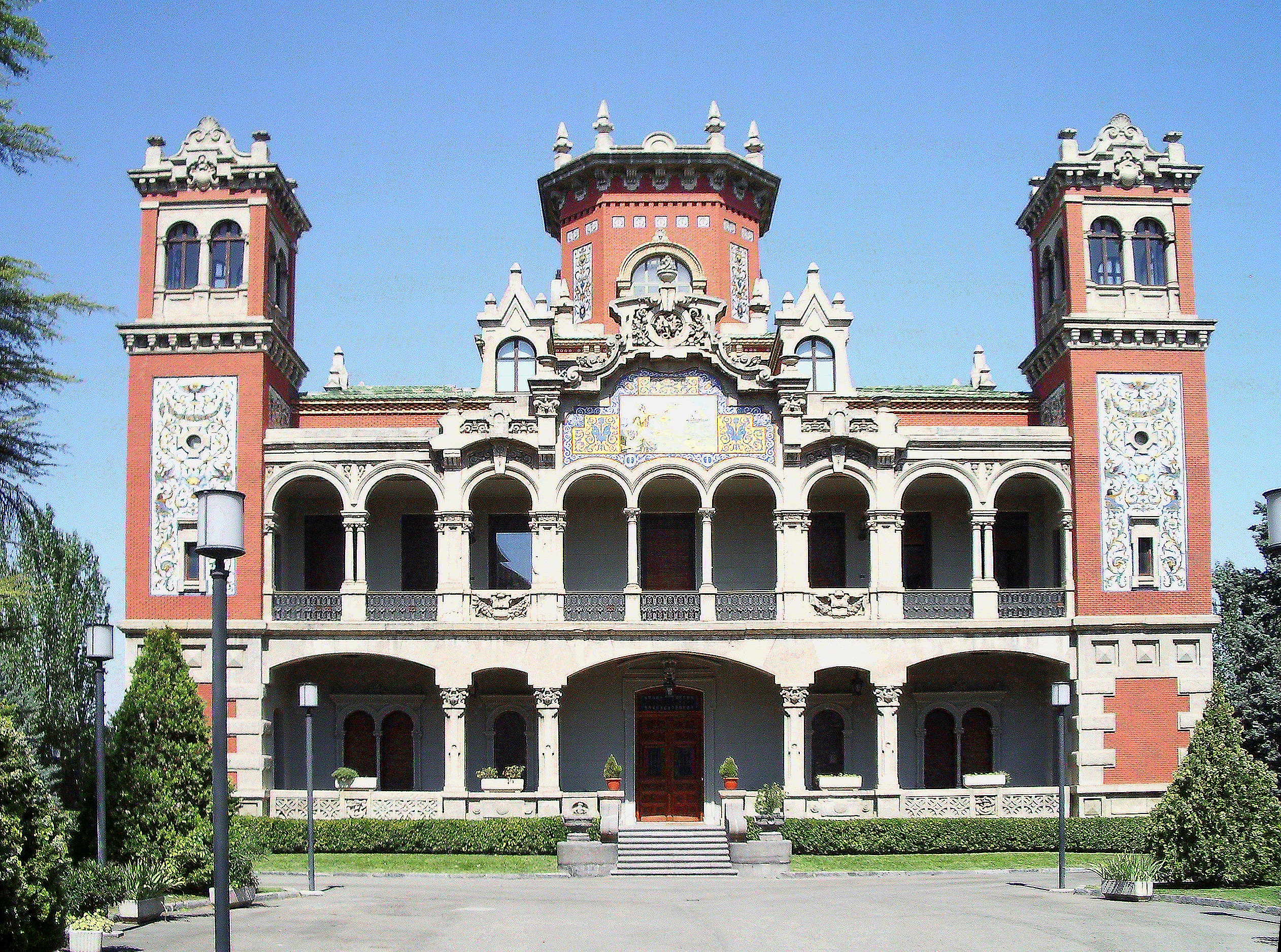 Palacio de Larrinaga (Zaragoza, España)